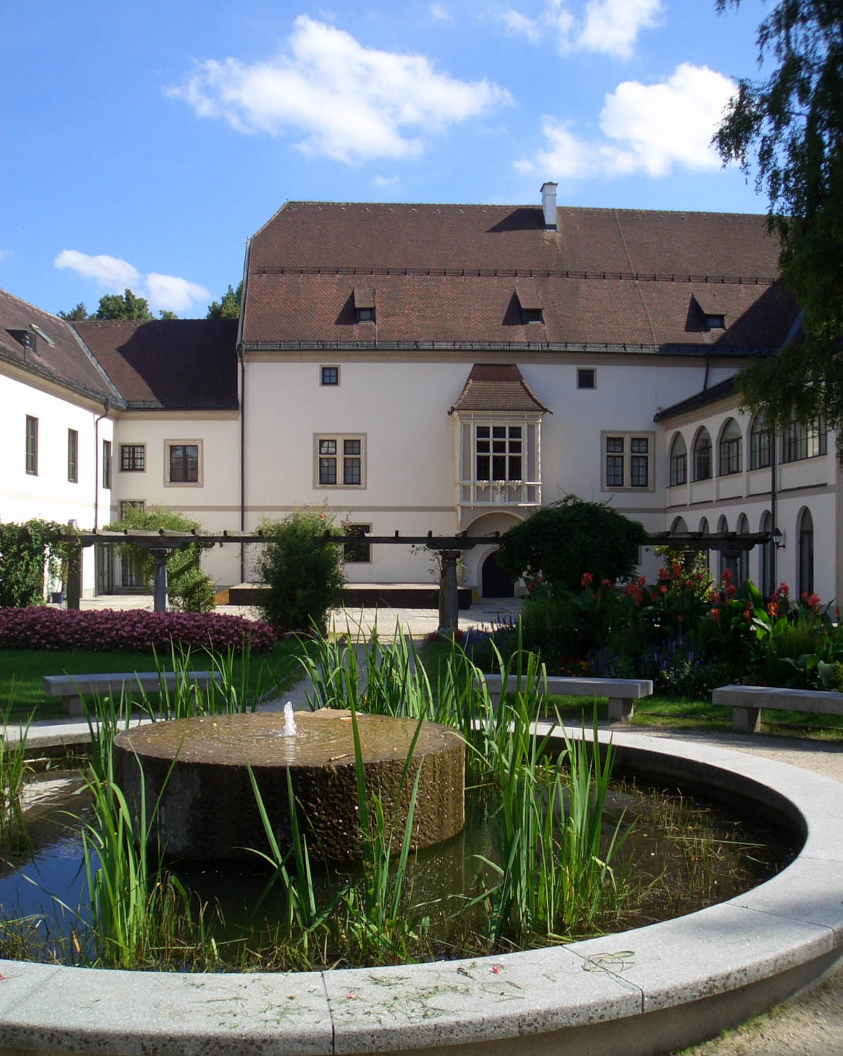 Burg Wels, vom Burggarten aus fotografiert